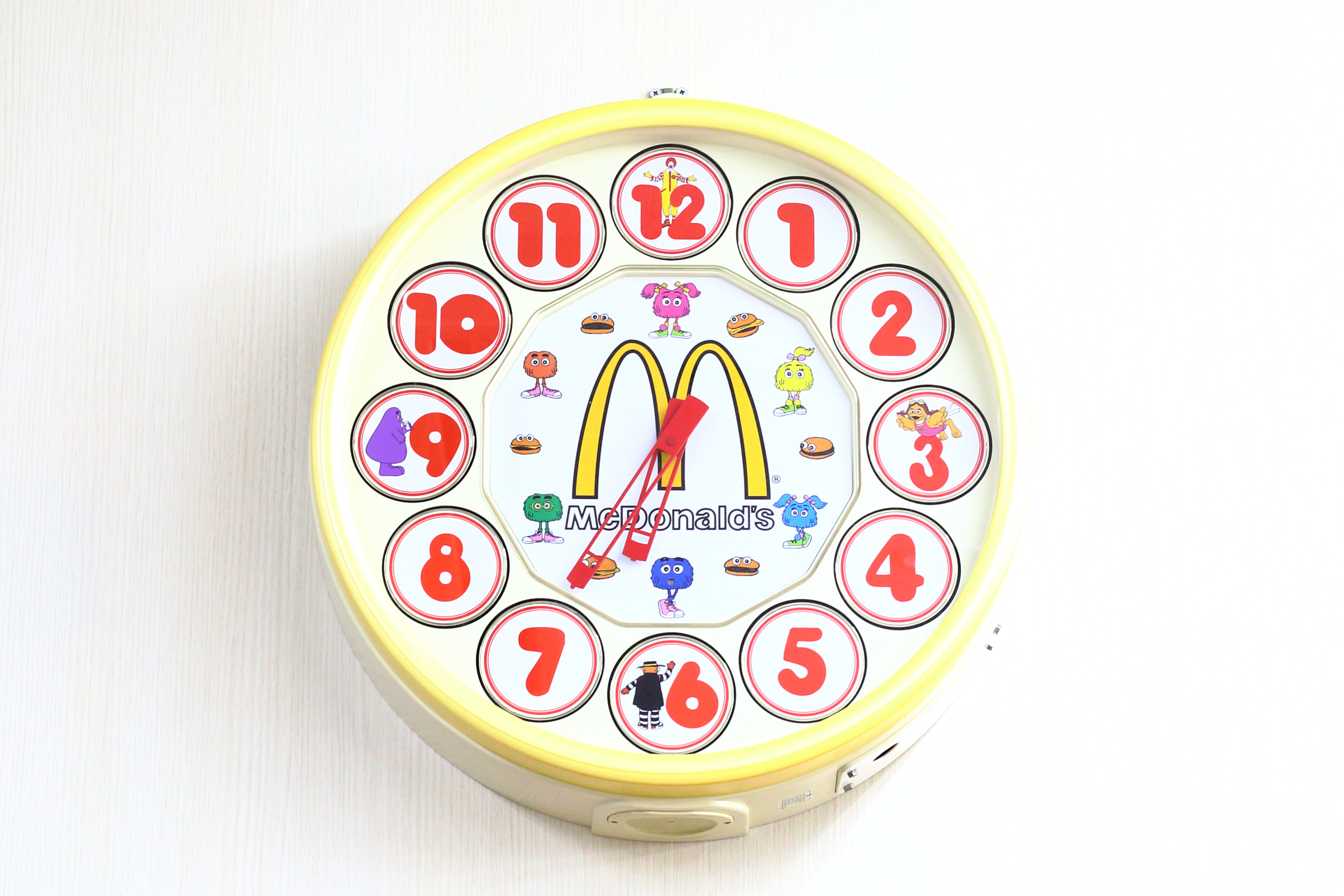 マクドナルド店内にあるドナルドの仲間たちが描かれた時計